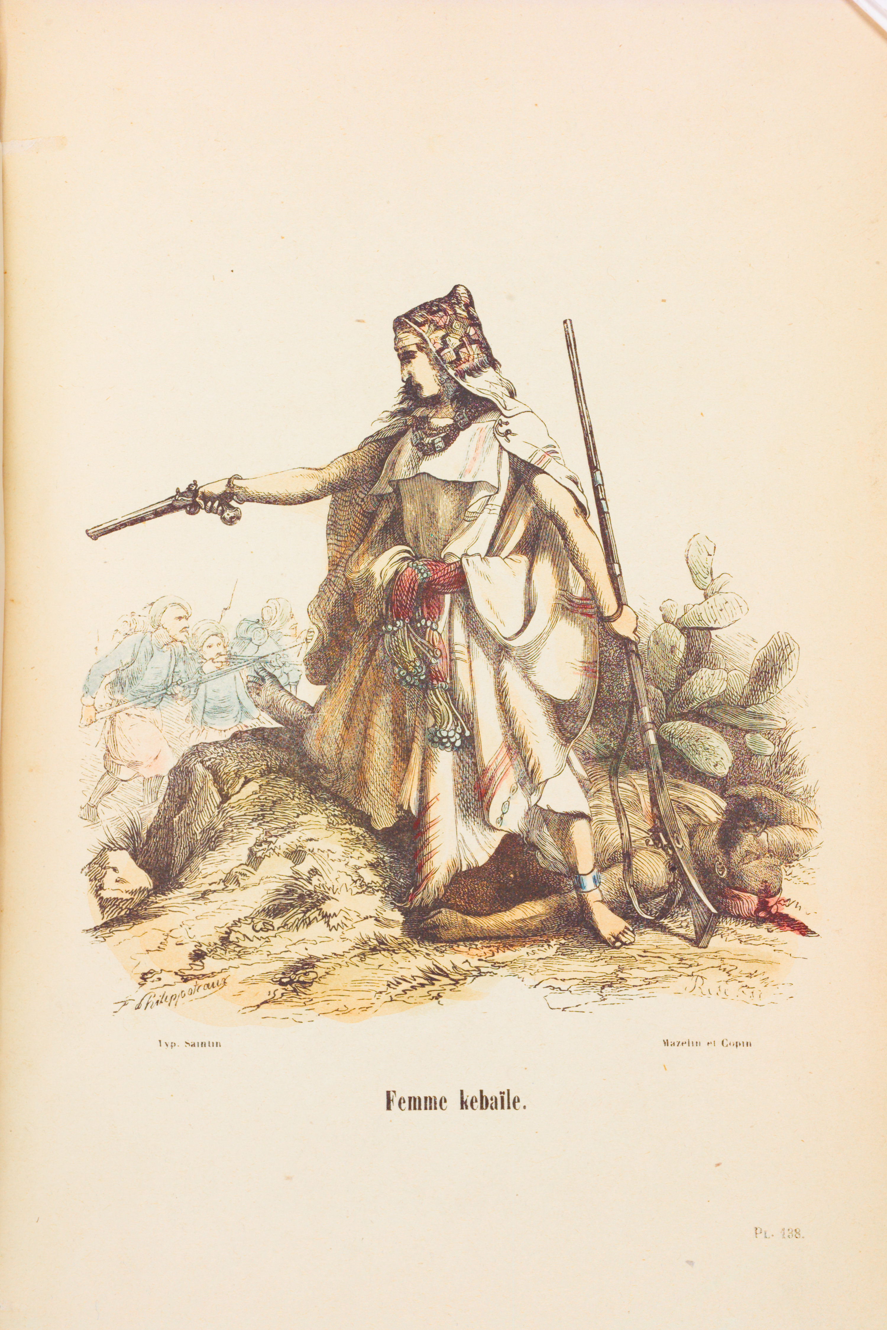 Cropped image of an engraving titled "Femme kebaïle". The engraving was published in Galerie des victoires et conquêtes de l'armée française et de tous les régiments depuis les premiers temps de la monarchie jusqu'à nos jours, Paris, 1850. (Although the title is "Kabyle woman", the image has sometimes been reused to illustrate texts about Lalla Fatma N'Soumer.)